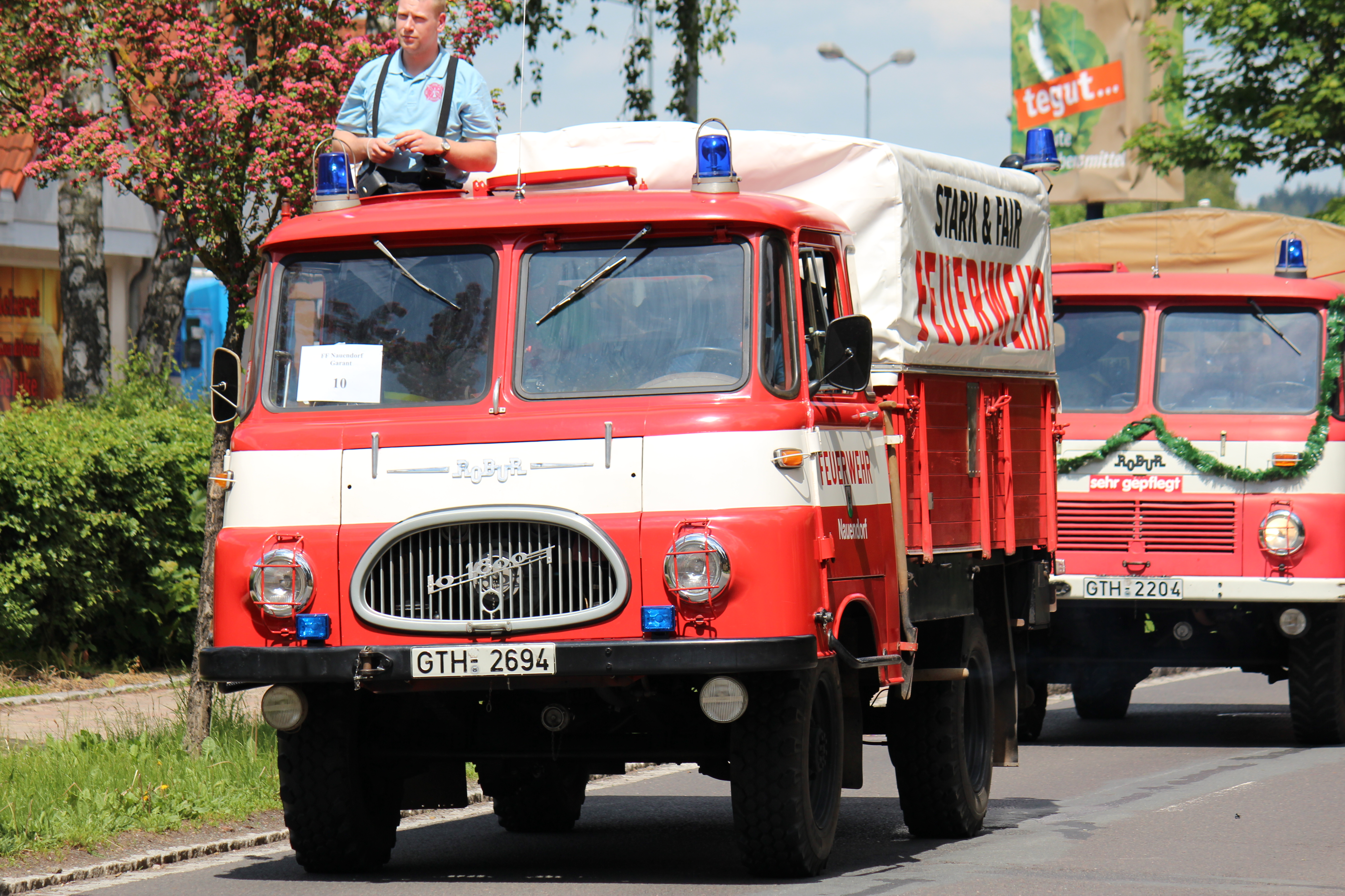 Feuerwehrfahrzeuge während des Stadtfeuerwehrtags 2012 in Tambach-Dietharz.